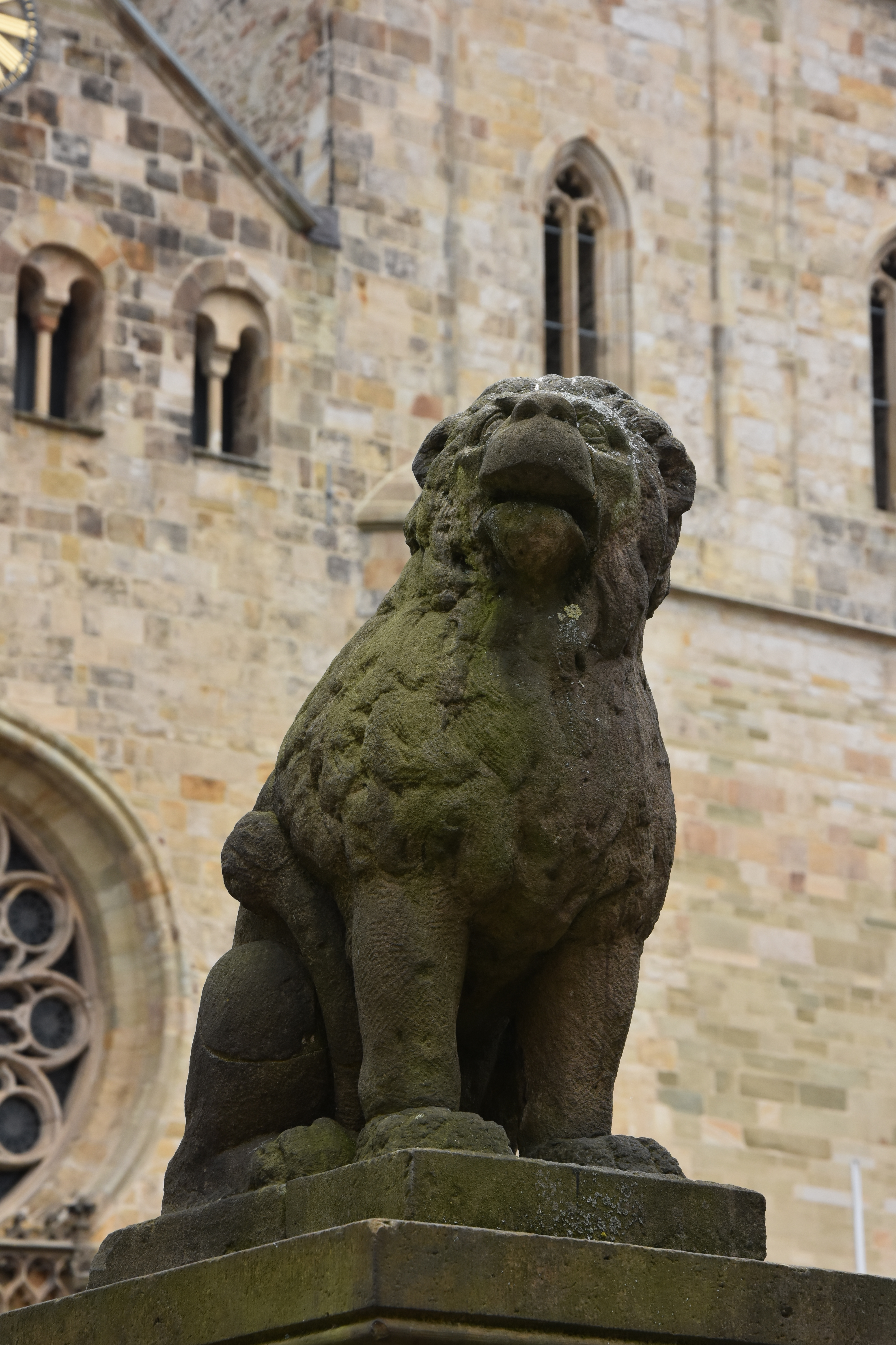 Löwenpudel